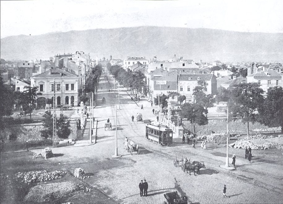 Lavov Most, Sofia, Bulgaria